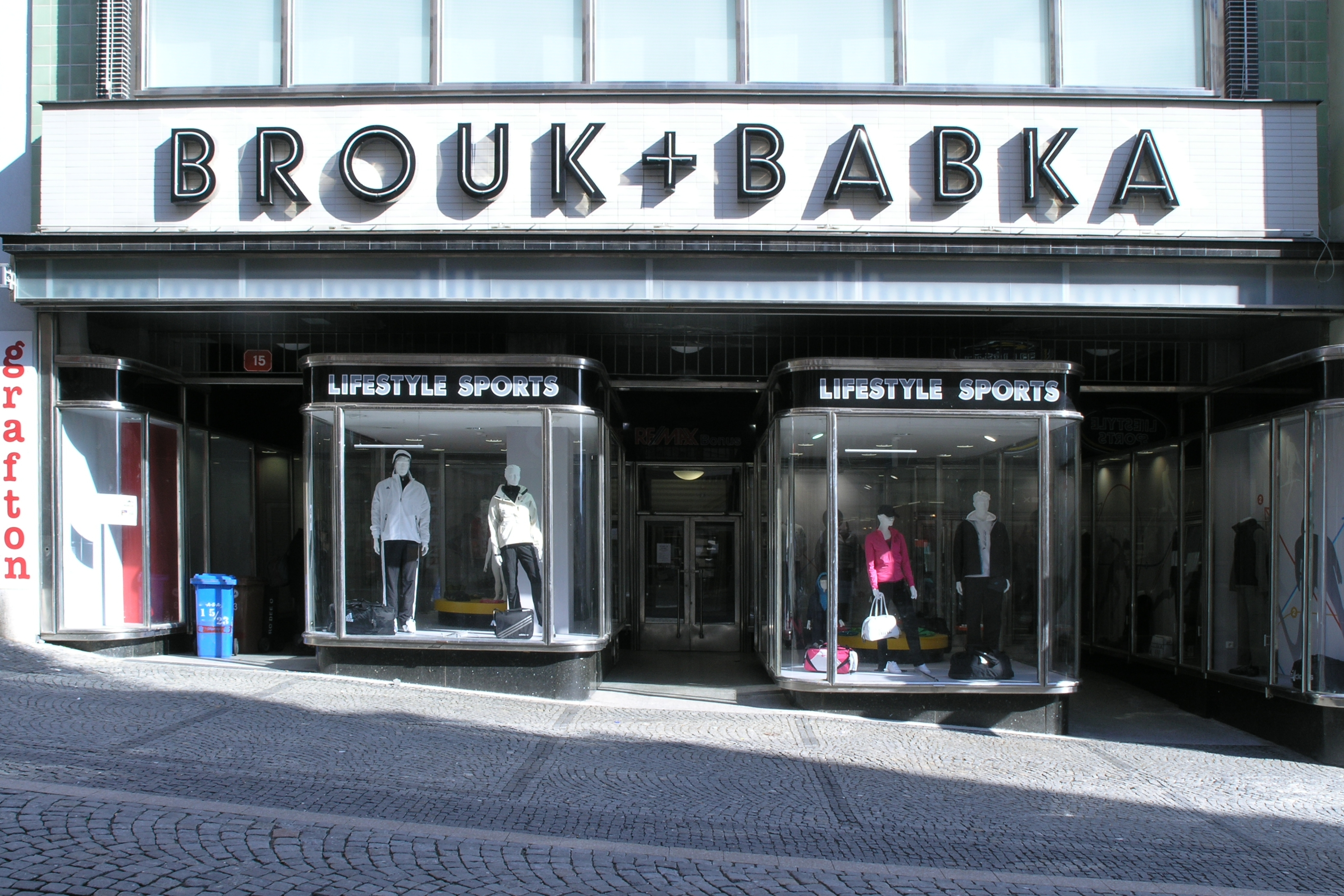 Liberec - obchodní dům Brouk a Babka